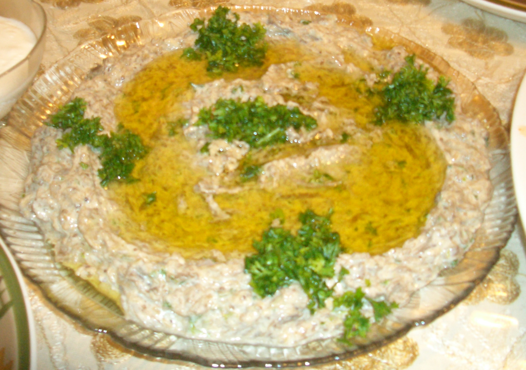 Mutabbel